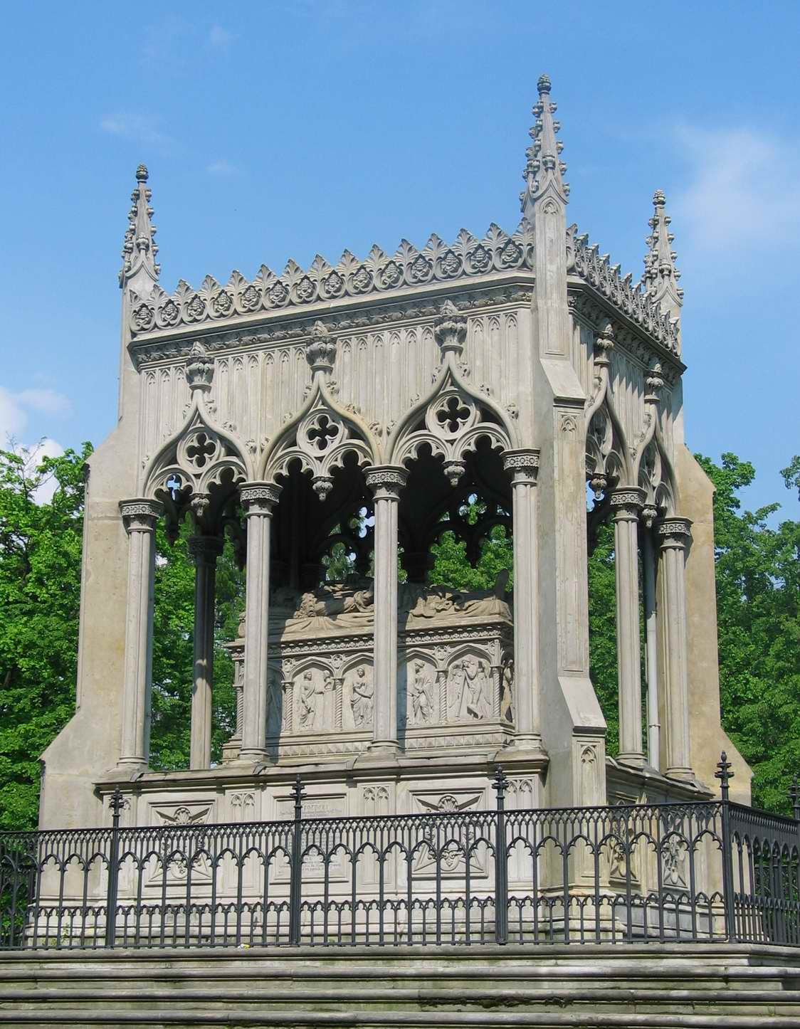 Grobowiec Stanisława Kostki Potockiego w Wilanowie.